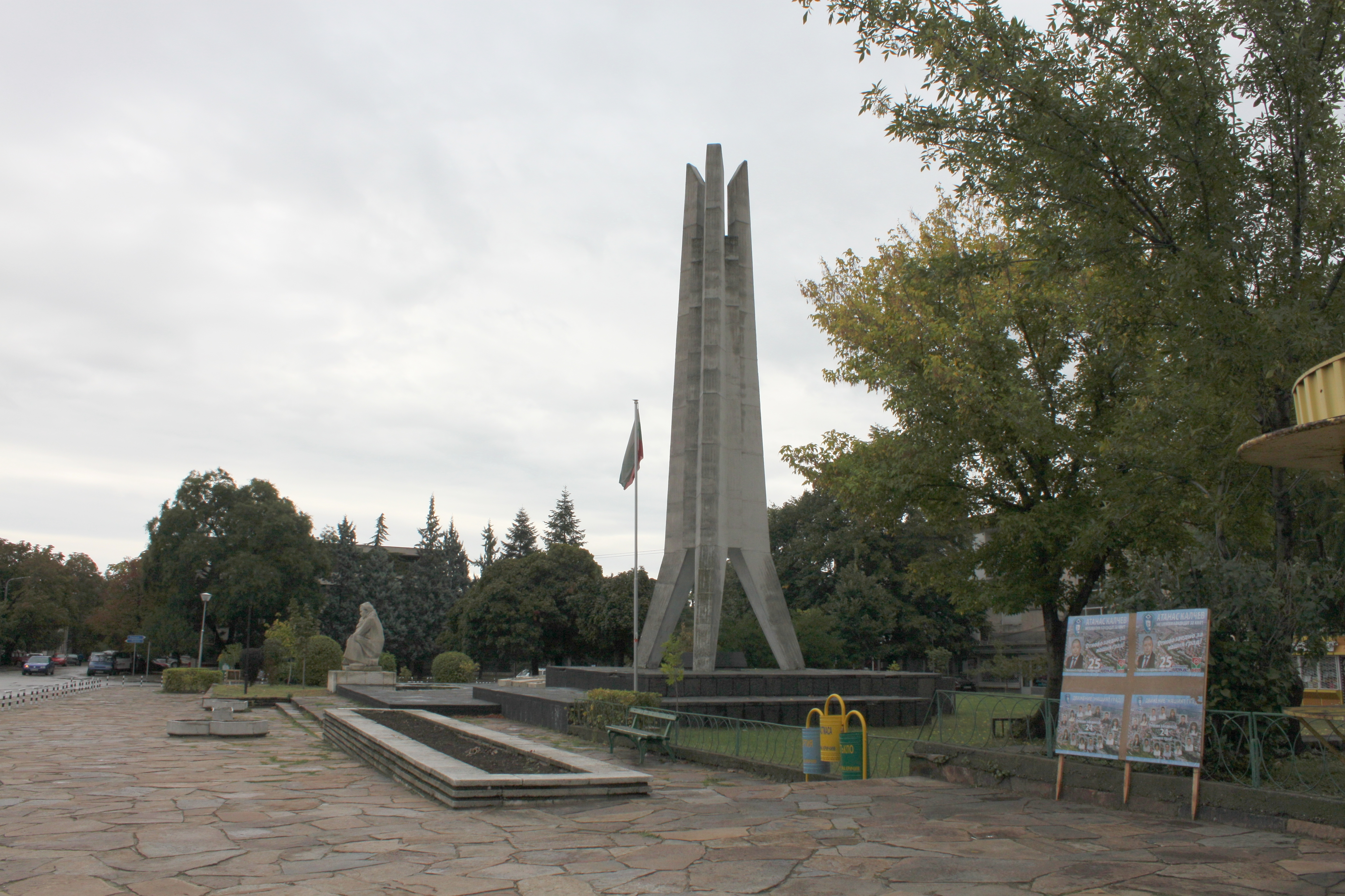 Kritschim, Bulgarien